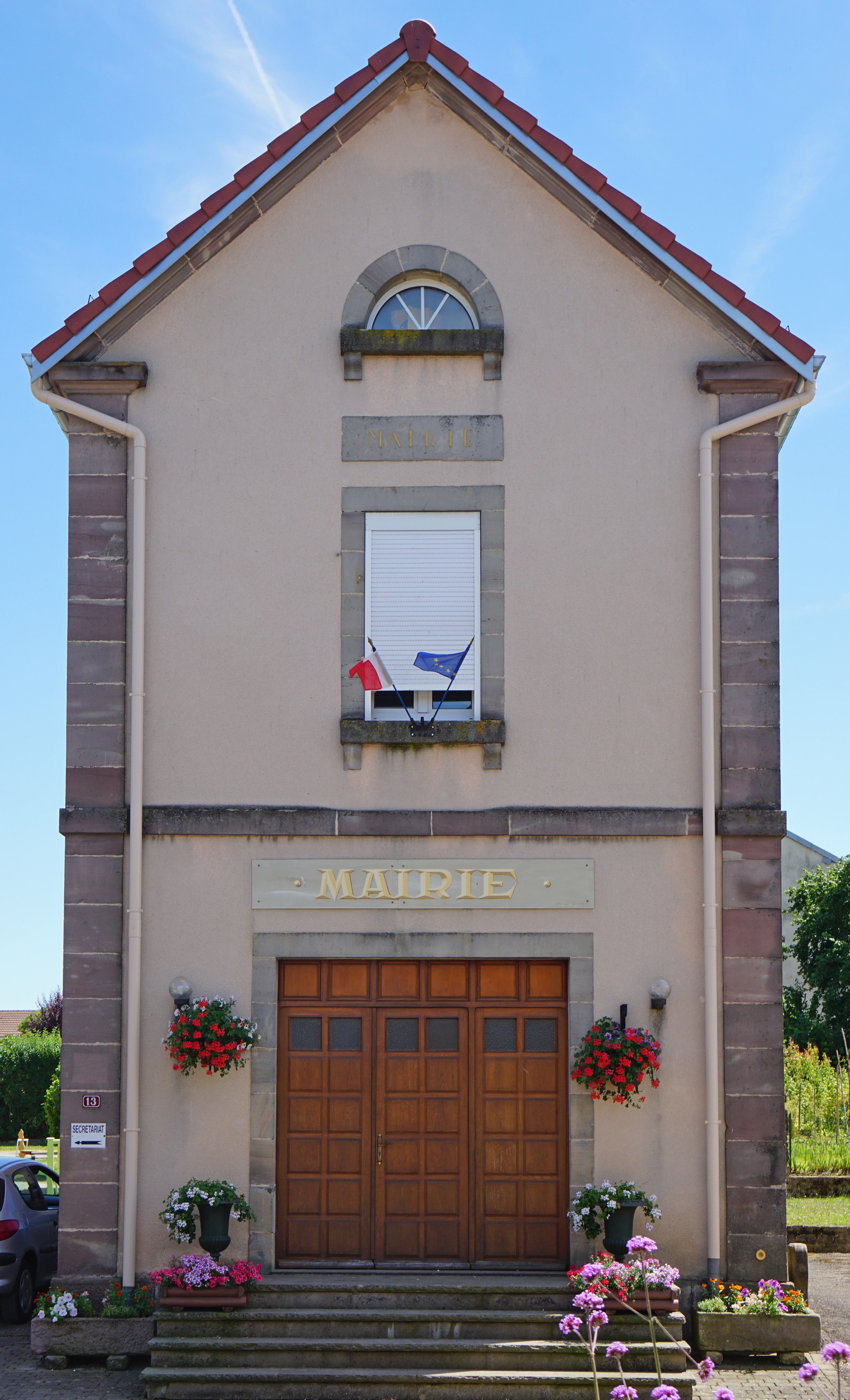 La mairie d'Éhuns.